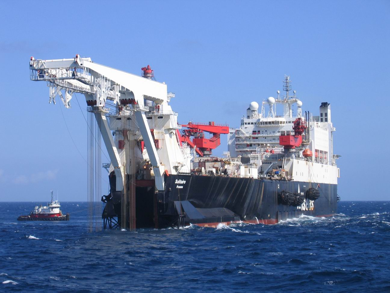 Allseas' Solitaire, anno 2017 het op een na grootste pijplegschip ter wereld. De grootste is de Pioneering Spirit (ship, 2014)